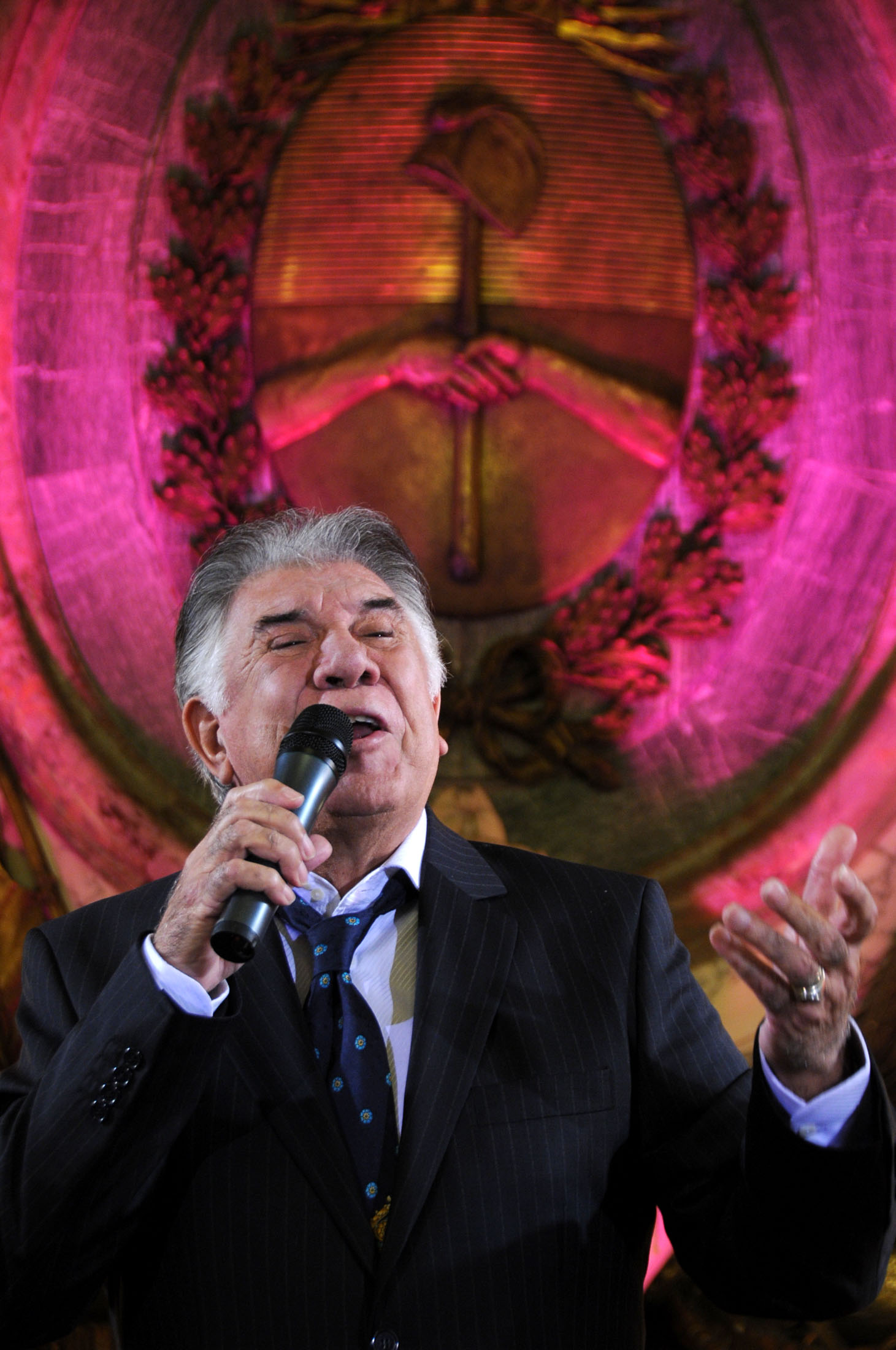 Raúl Lavié en el Salón Blanco, durante el recital que llevó a cabo el viernes a la noche.